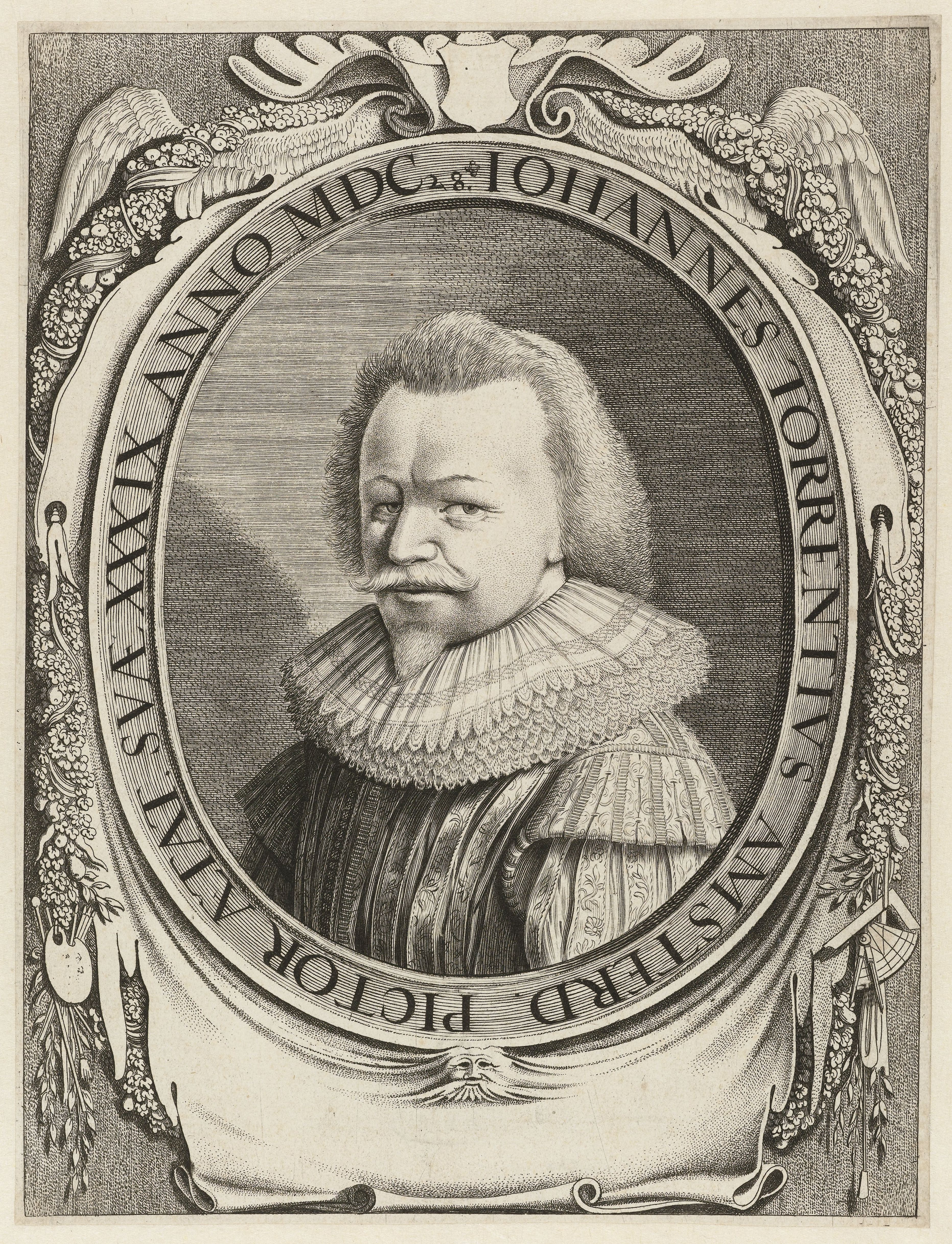 IdentificatieTitel(s): Portret van Johannes TorrentiusObjecttype: prent Objectnummer: RP-P-1898-A-20225Catalogusreferentie: Hollstein Dutch 413-2(3)Franken&van der Kellen 40-1(2)Van Someren 5602Opschriften / Merken: verzamelaarsmerk, verso, gestempeld: Lugt 964Omschrijving: Portret van de Amsterdamse schilder Johannes Torrentius op 39-jarige leeftijd. Links- en rechtsonder het cartouche schilders- en tekenattributen.VervaardigingVervaardiger: prentmaker: Jan van de Velde (II)naar ontwerp van: Salomon de Bray (mogelijk)Plaats vervaardiging: Noordelijke NederlandenDatering: 1628Fysieke kenmerken: ets en gravureMateriaal: papier Techniek: etsen / graveren (drukprocedé)Afmetingen: blad: h 197 mm × b 150 mmToelichtingLatere staat van de prent gebruikt als boekillustratie in: Leyds- veer-schuyts-praetgen. Tusschen een koopman ende borgher van Leyden (...) inhoudende de geschiedenissen voor-gevallen, tusschen Torrentius ende de magistraet van Haerlem. Amsterdam: Willem Jansz Wyngaert, 1628.OnderwerpWat: tools, implements of painterWie: Johannes TorrentiusVerwerving en rechtenCredit line: Legaat van de heer D. Franken, Le VésinetVerwerving: legaat 1898Copyright: Publiek domein